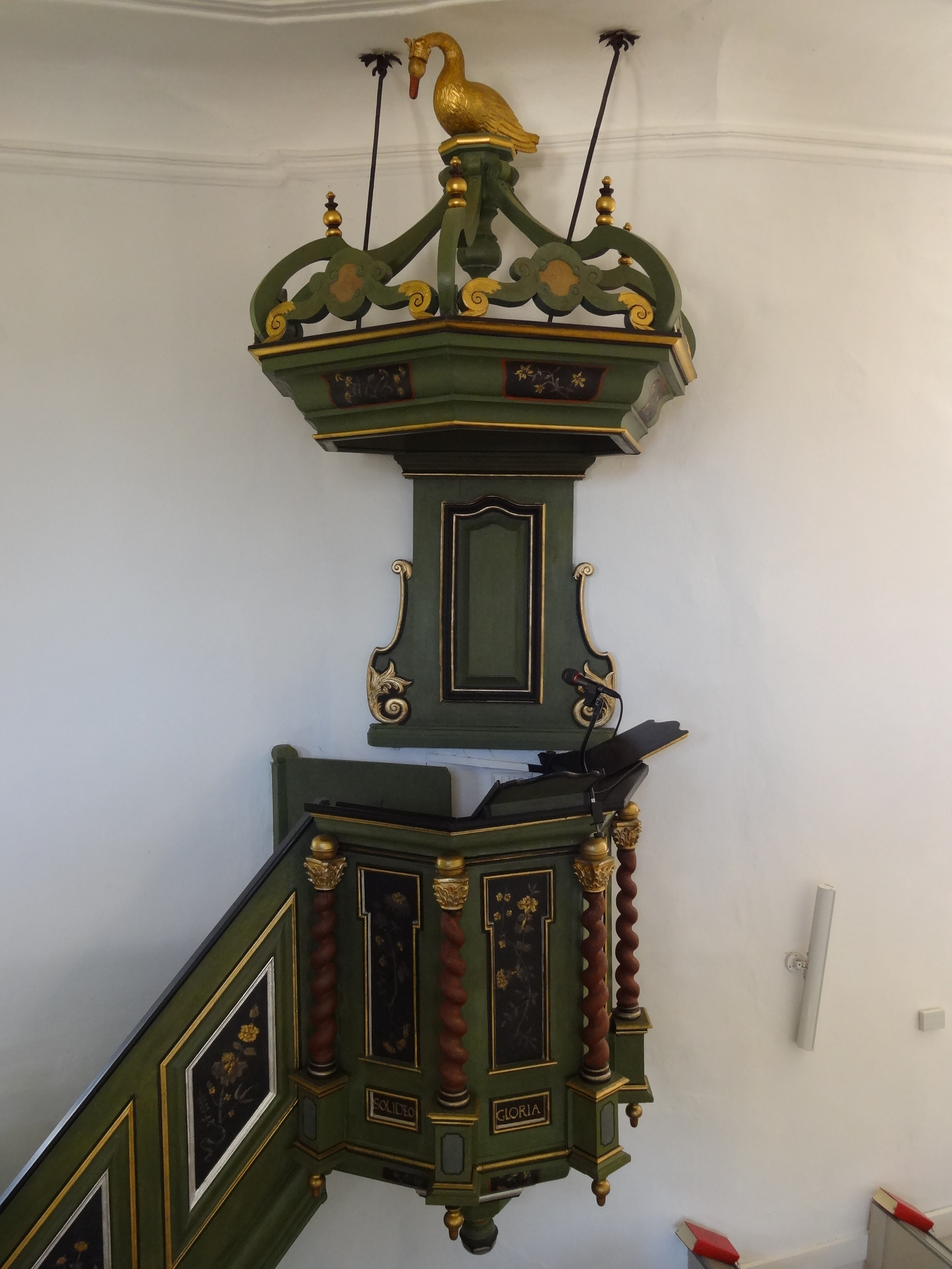 Evangelische Pfarrkirche Ebersgöns